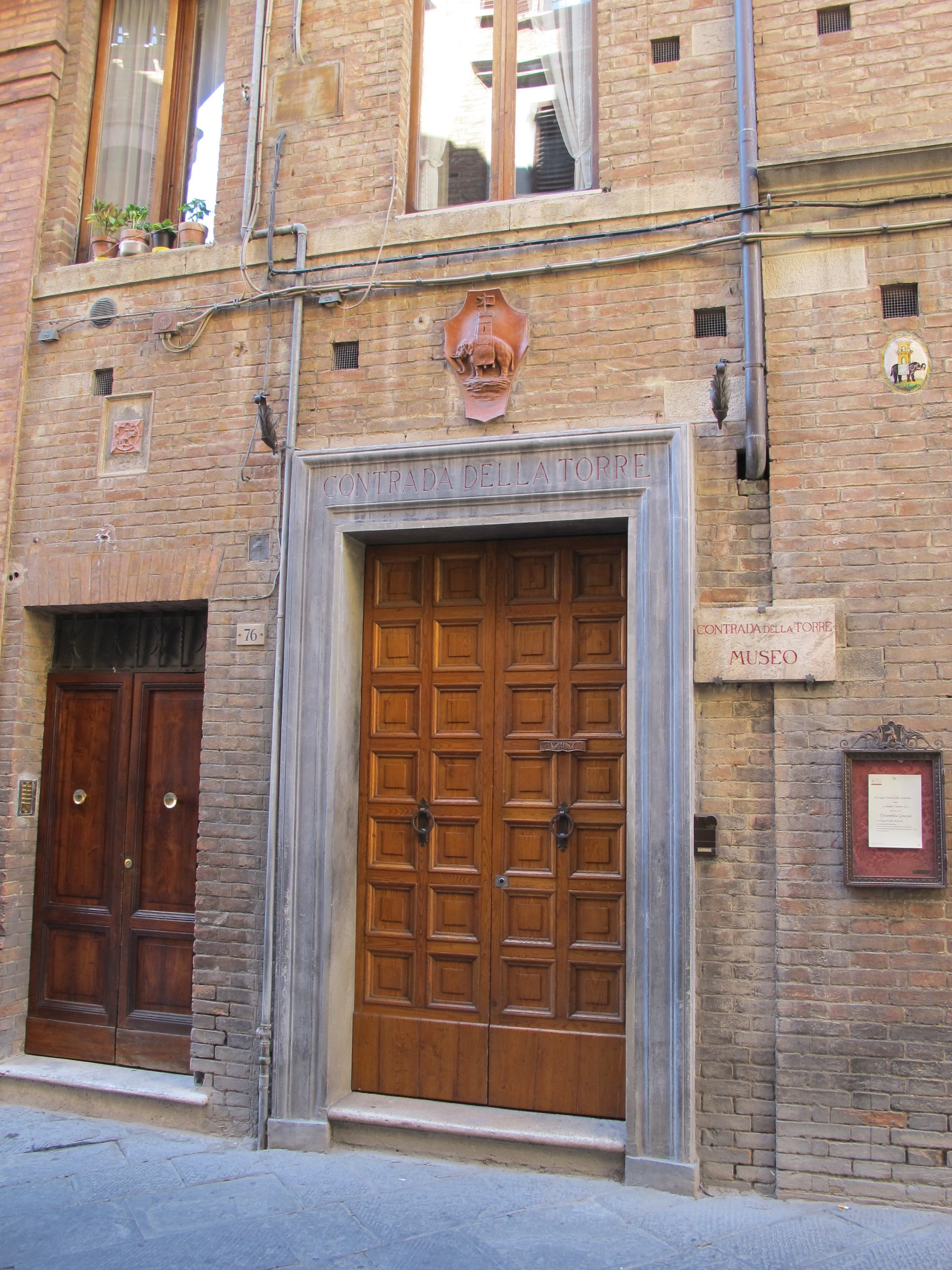 San giacomo, siena